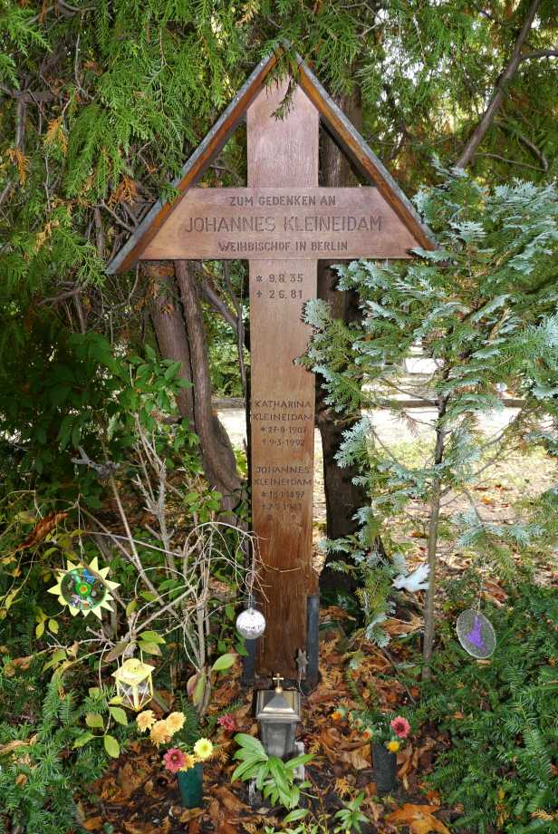 Grabkreuz von Weihbischof Johannes Kleineidam auf dem Sankt-Matthias-Friedhof in Berlin-Tempelhof